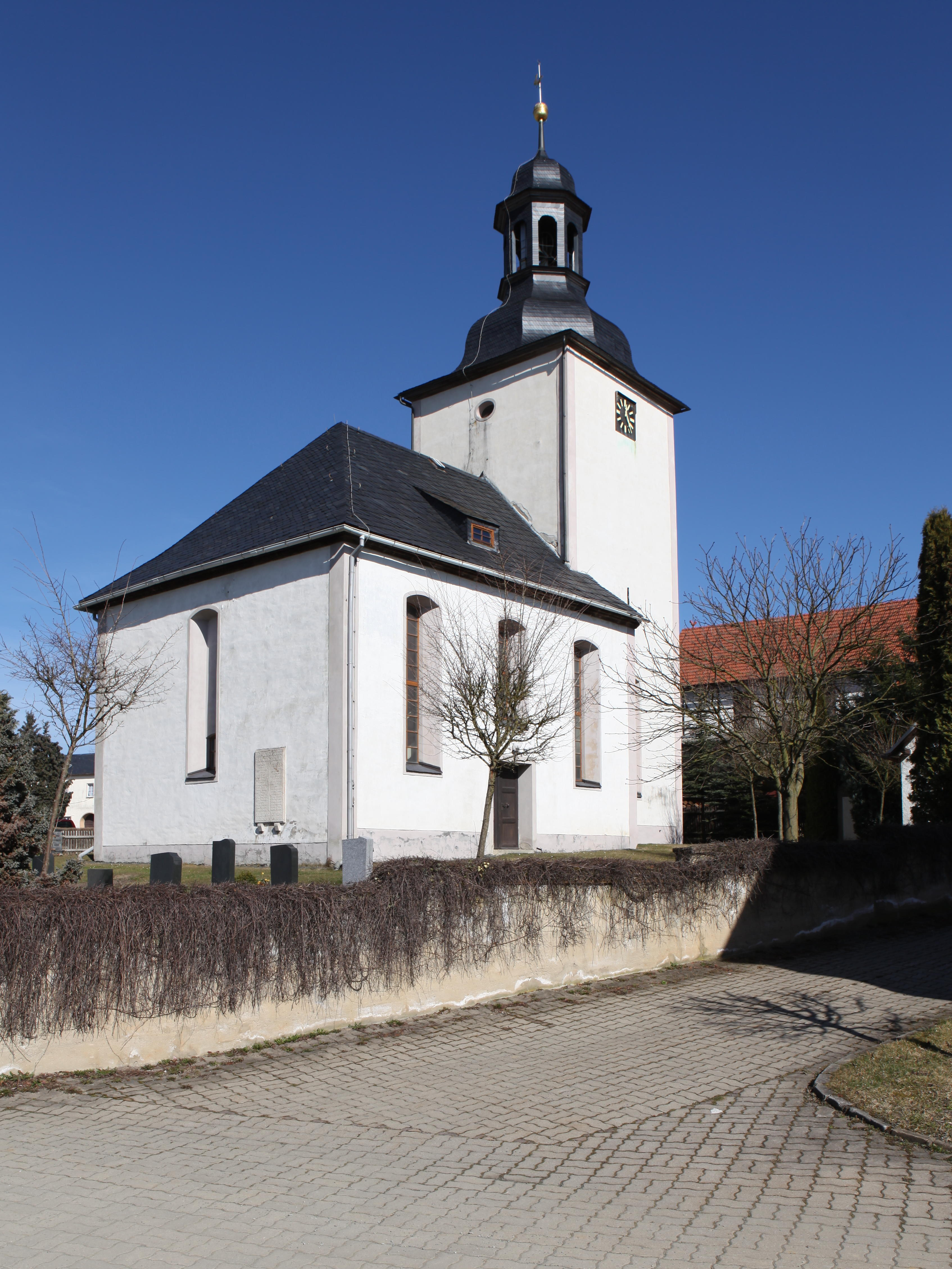 Mielesdorf-Ev-Kirche